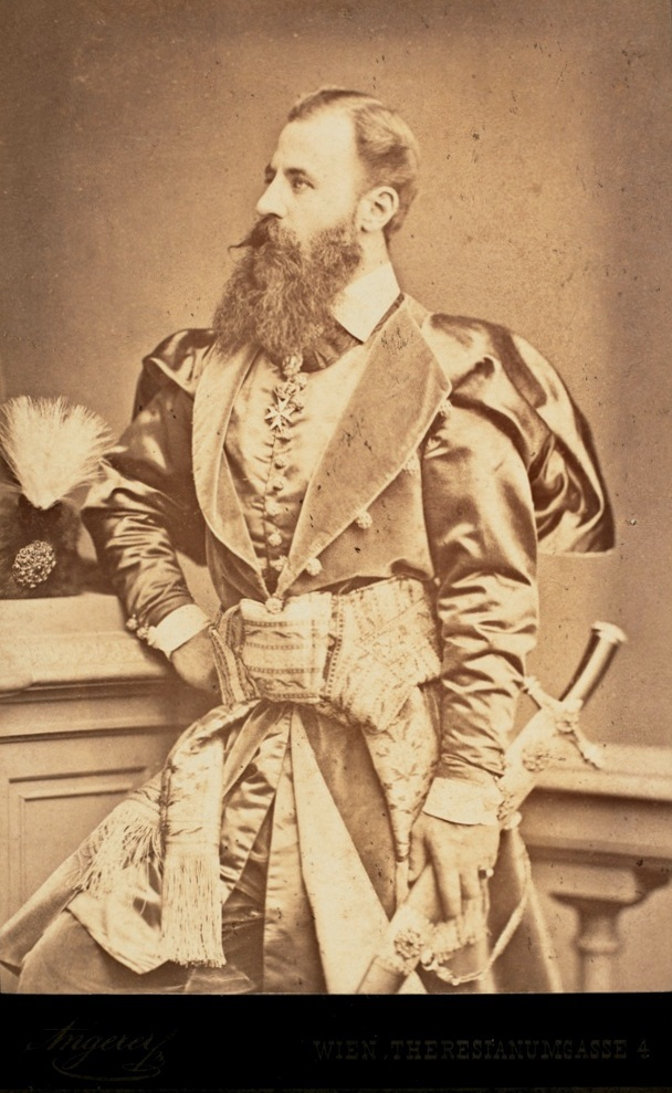 Józef Hussarzewski w kontuszu